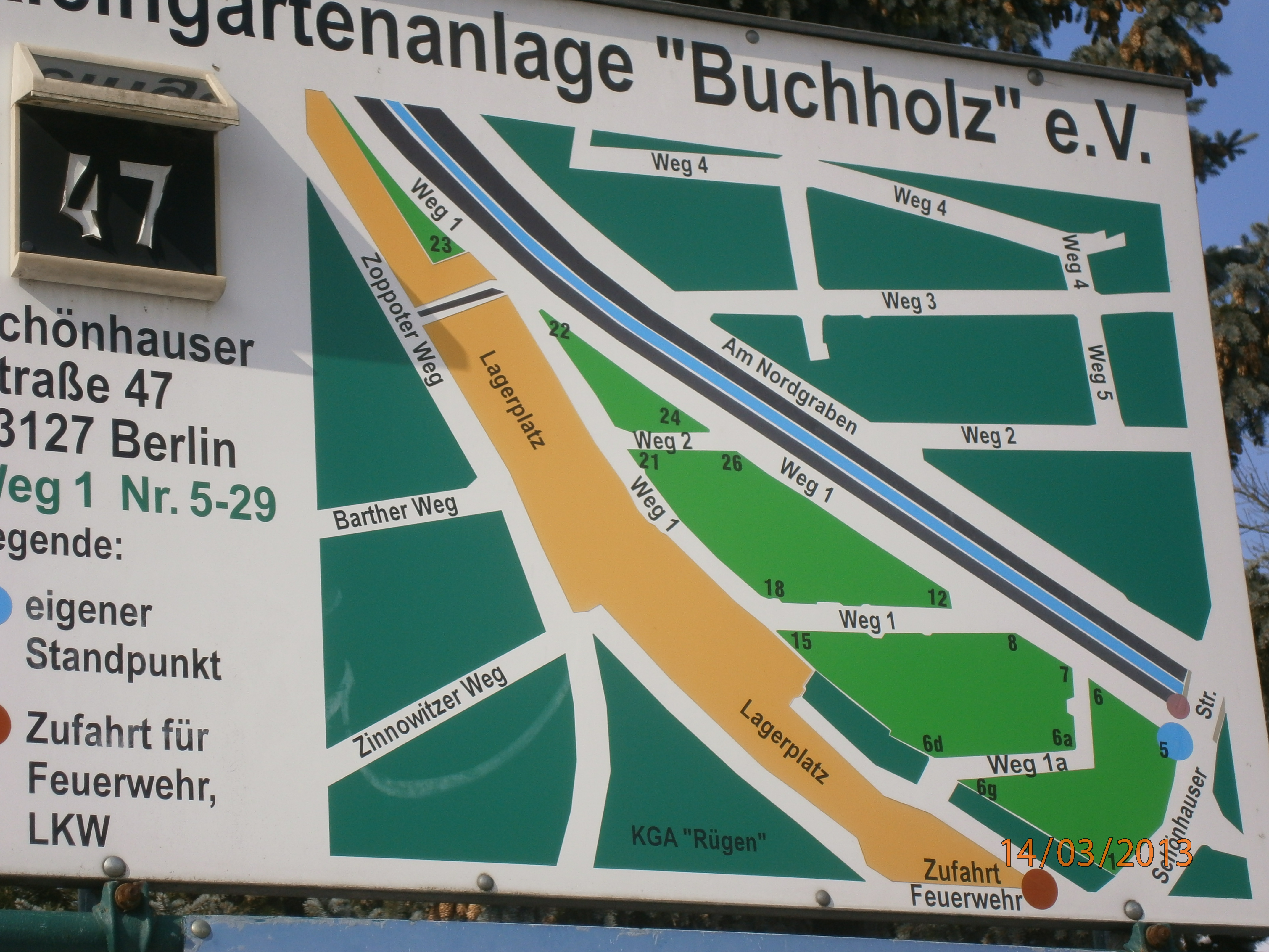 KGA Buchholz ist eine Gartenanlage mit Straßen im Ortsteil Berlin-Französisch Buchholz (hier in Blickrichtung: West)